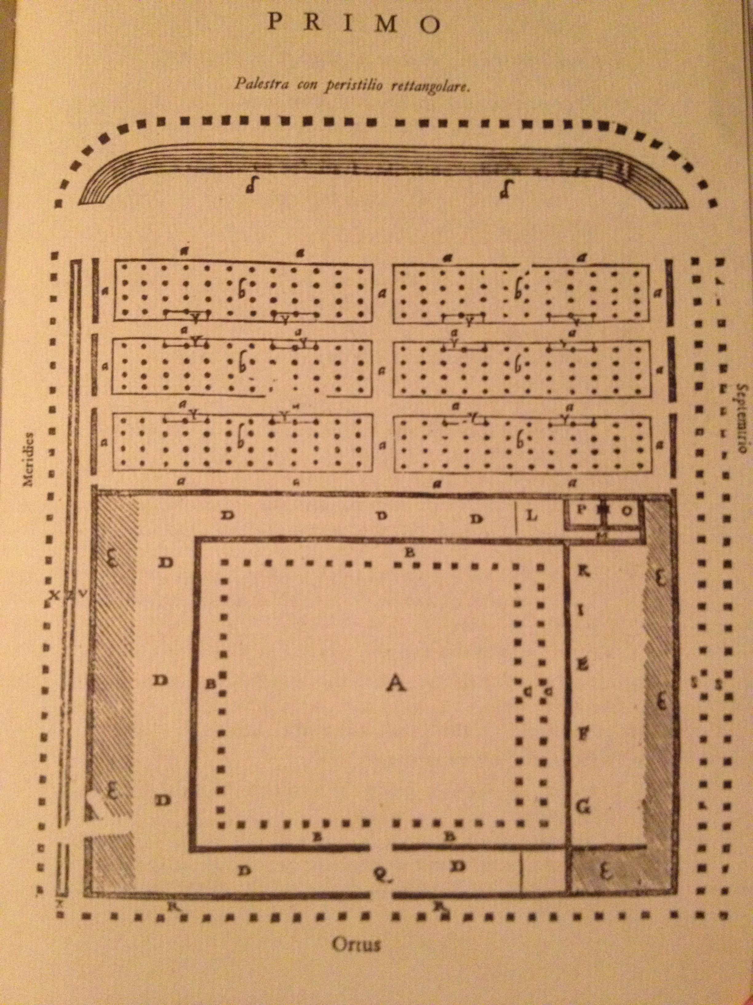 Raffigurazione della pianta di un antico ginnasio su modello vitruviano